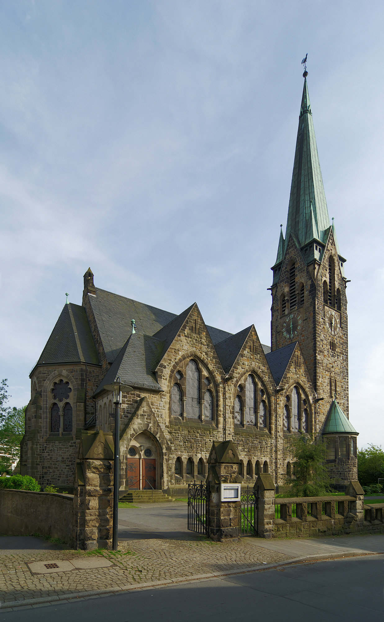 Lutherkirche in Wetter an der Ruhr This is a photograph of an architectural monument.